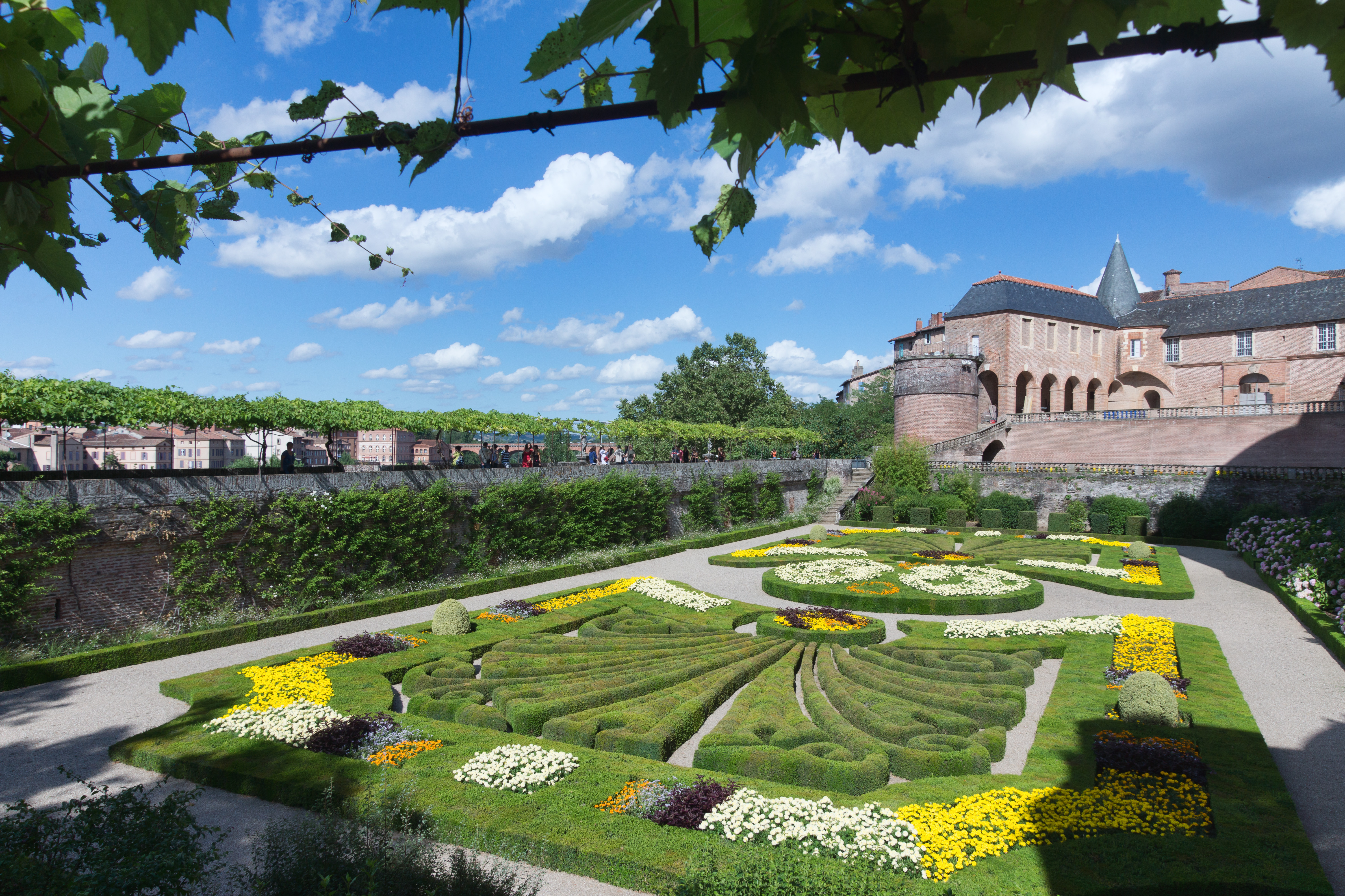 Jardins du Palais de la Berbie